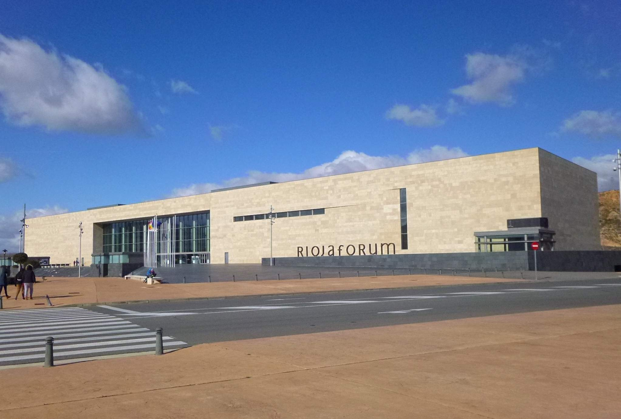 Riojaforum (Palacio de Congresos de La Rioja), en Logroño